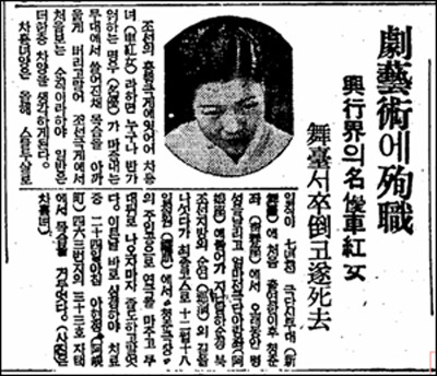 車紅女の舞台での死を報じる記事（1940年12月24日付）